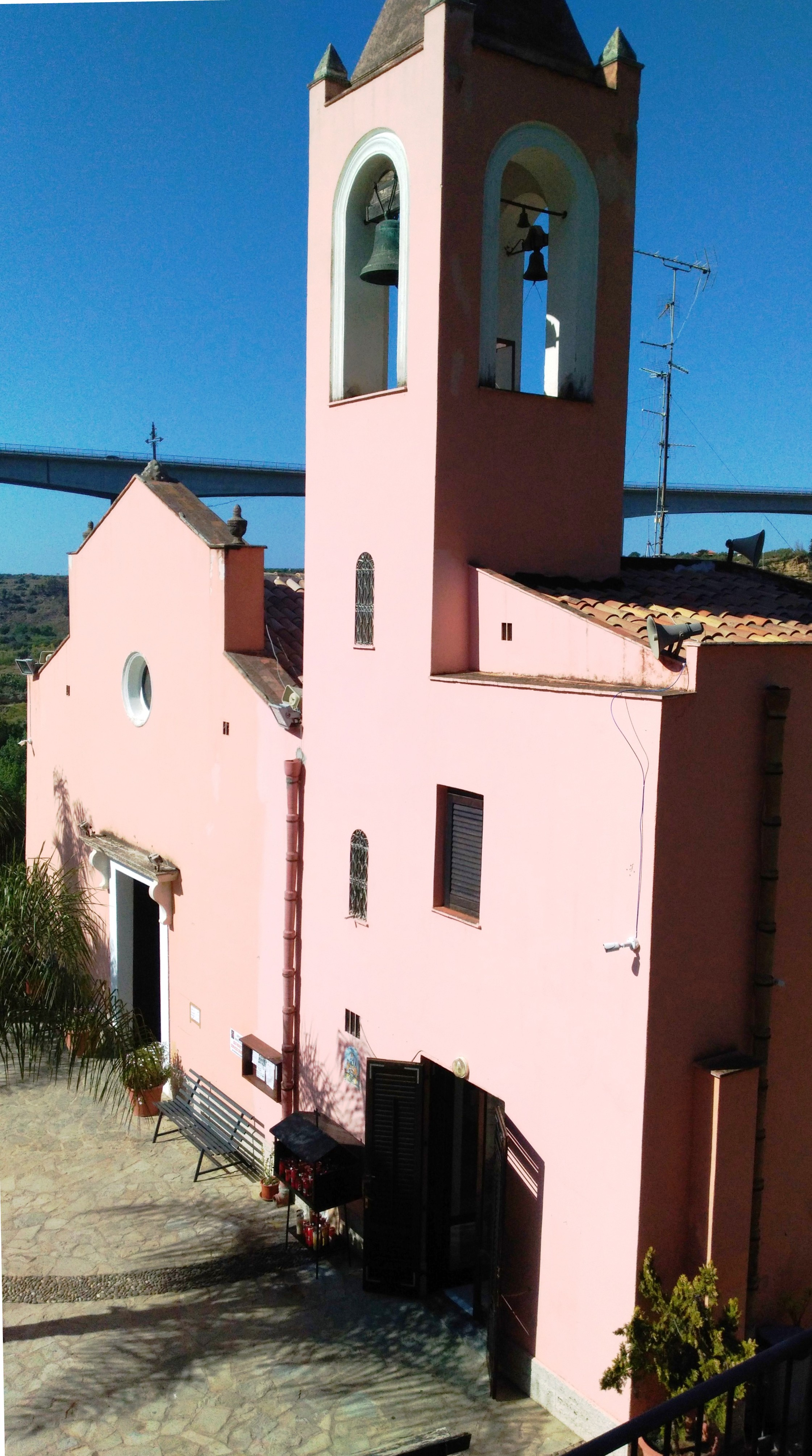 Esterno della chiesa